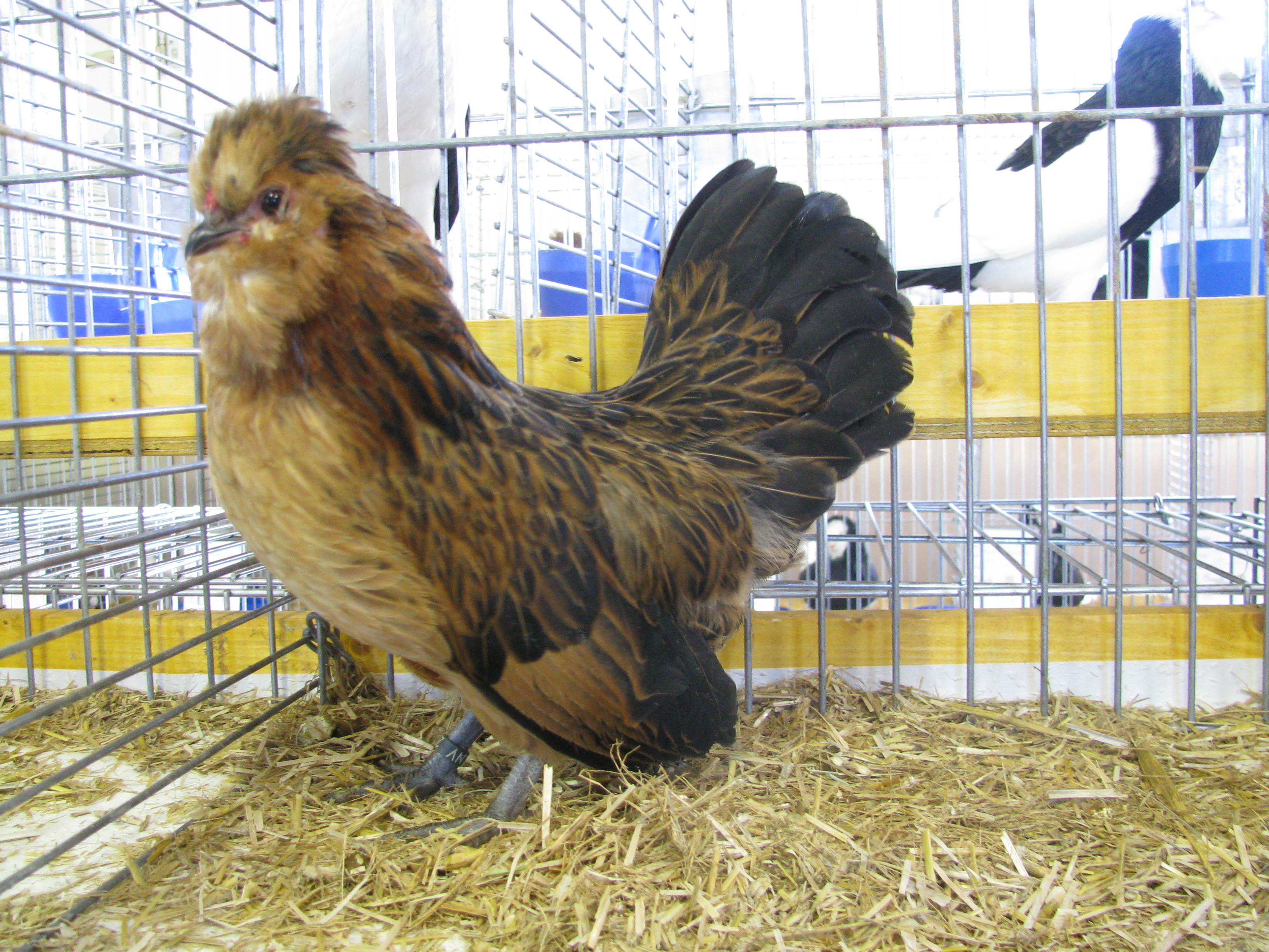 RGZV Frankenthal e.V. – Lokalschau in der Turnhalle Frankenthal vom 22. bis 23. November 2014 0,1 Watermaalsche Bartzwerge, wachtelfarbig, hv96